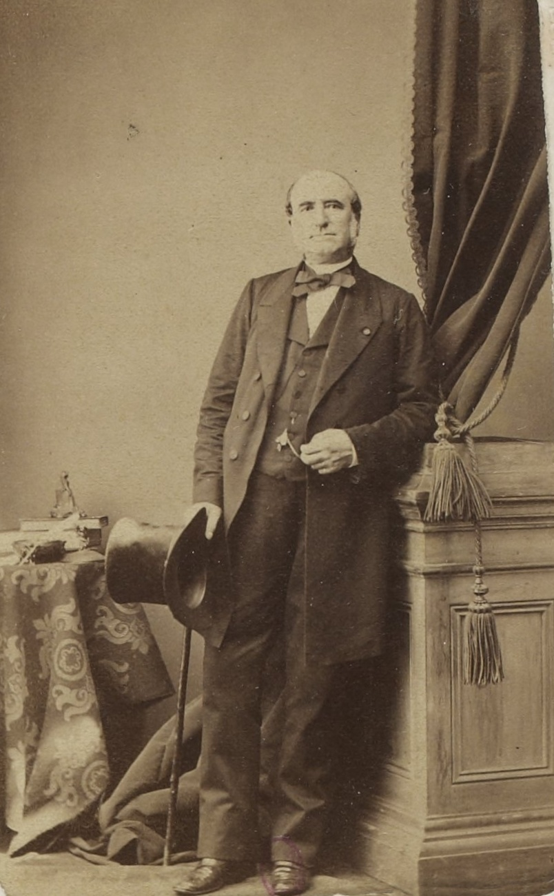 Personnalités françaises et étrangères sous le Second Empire.